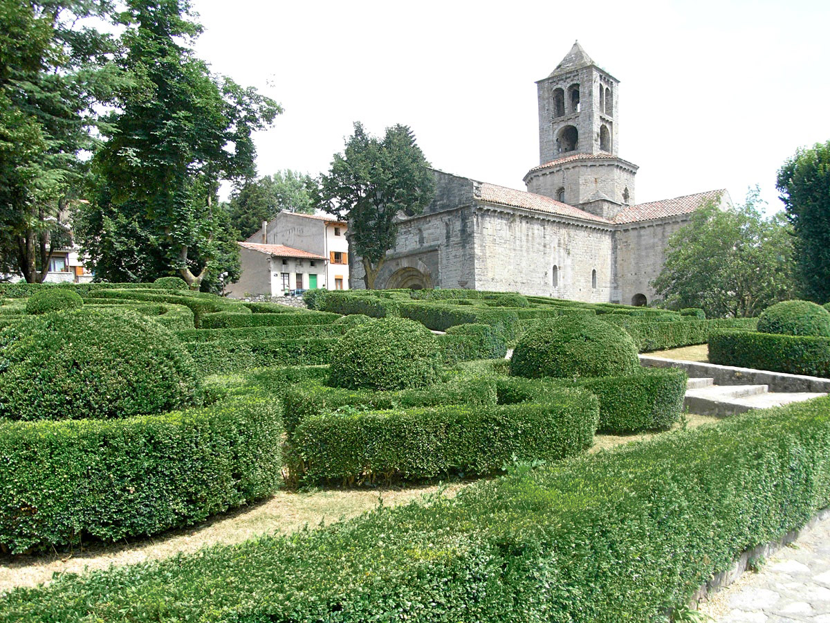 Monestir de Sant Pere de Camprodon